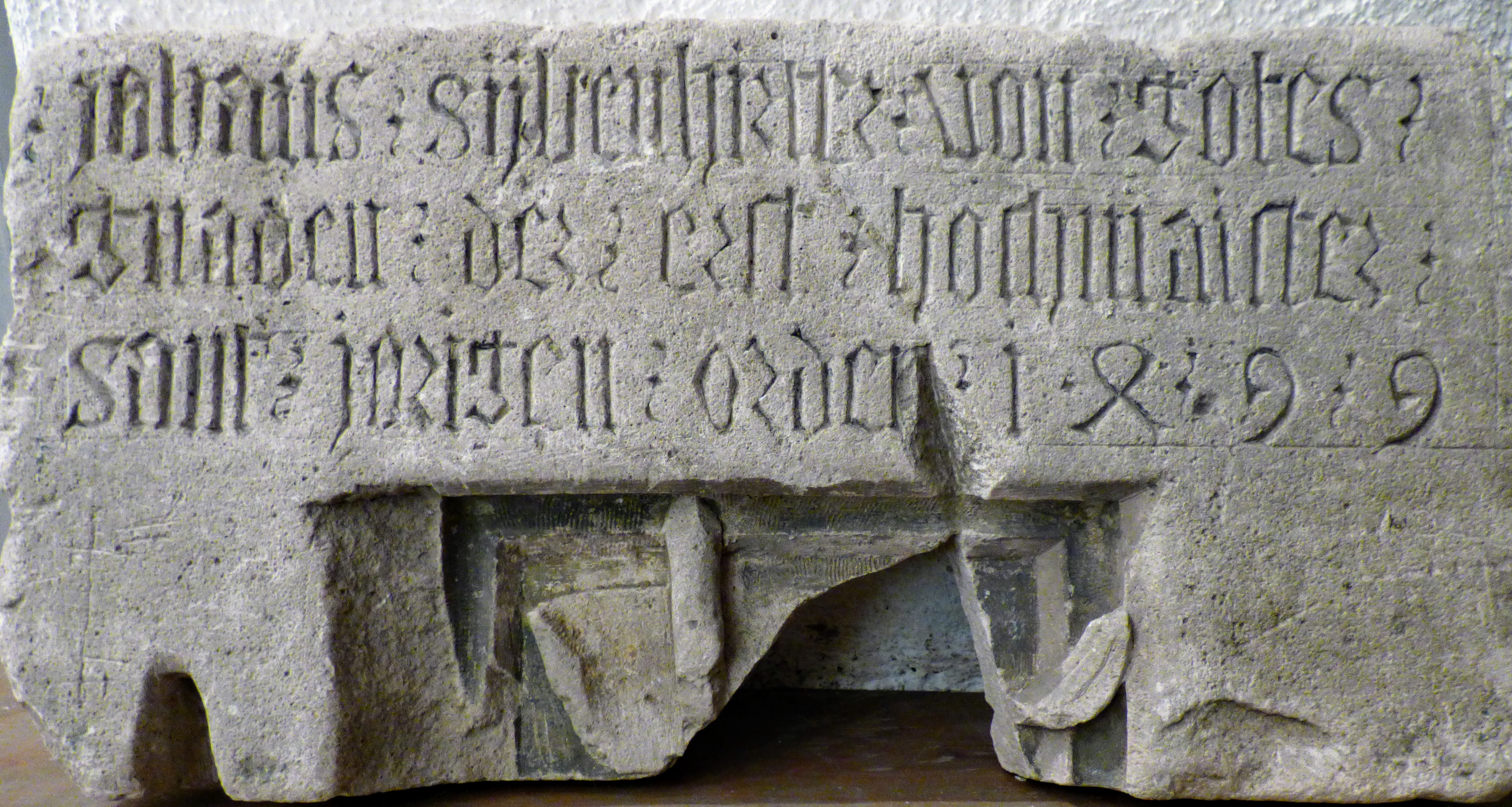 Stiftsmuseum Millstatt: Fragment eines Wappensteins, mit Inschrift "johans sijbenhirter von gotes gnaden der erst hochmaister sant jorigen orden 1499" ("Johann Siebenhirter, von Gottes Gnaden der erste Hochmeister des Sankt Georgs Ordens 1499")